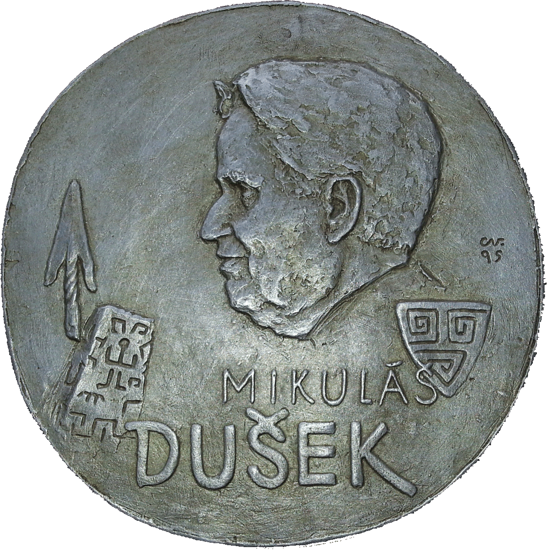 Dr.MIkuláš Dušek na plakete Ľudmily Cvengrošovej